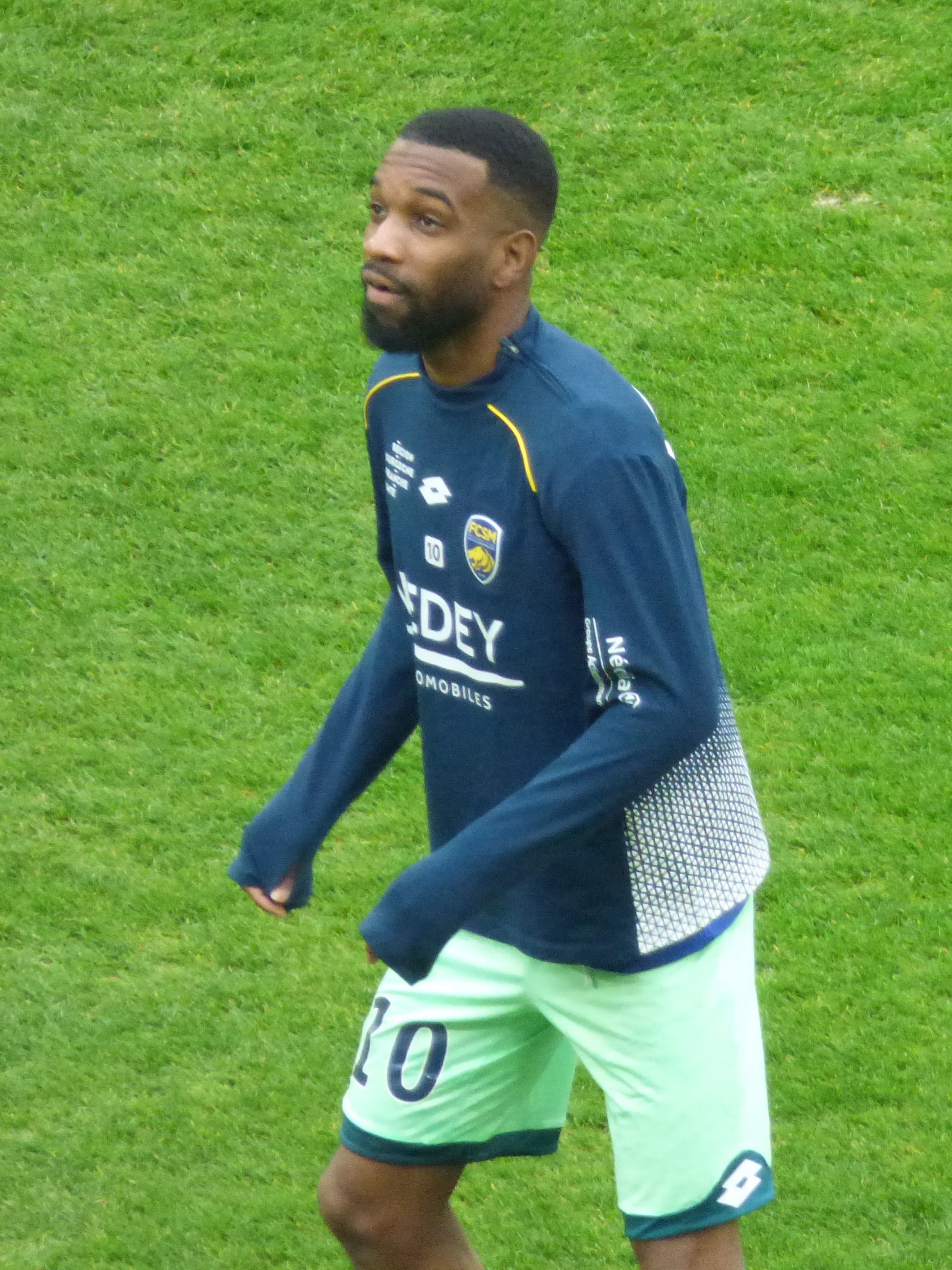 Fabien Ourega avant le match RC Lens / FC Sochaux, comptant pour la quinzième journée du championnat de France de Ligue 2 de football 2019-2020, le 23 novembre 2019, au Stade Bollaert-Delelis.